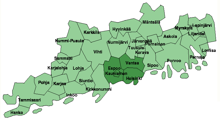 Uusimaa map.